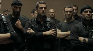 סצינה מתוך הסרט השוטר